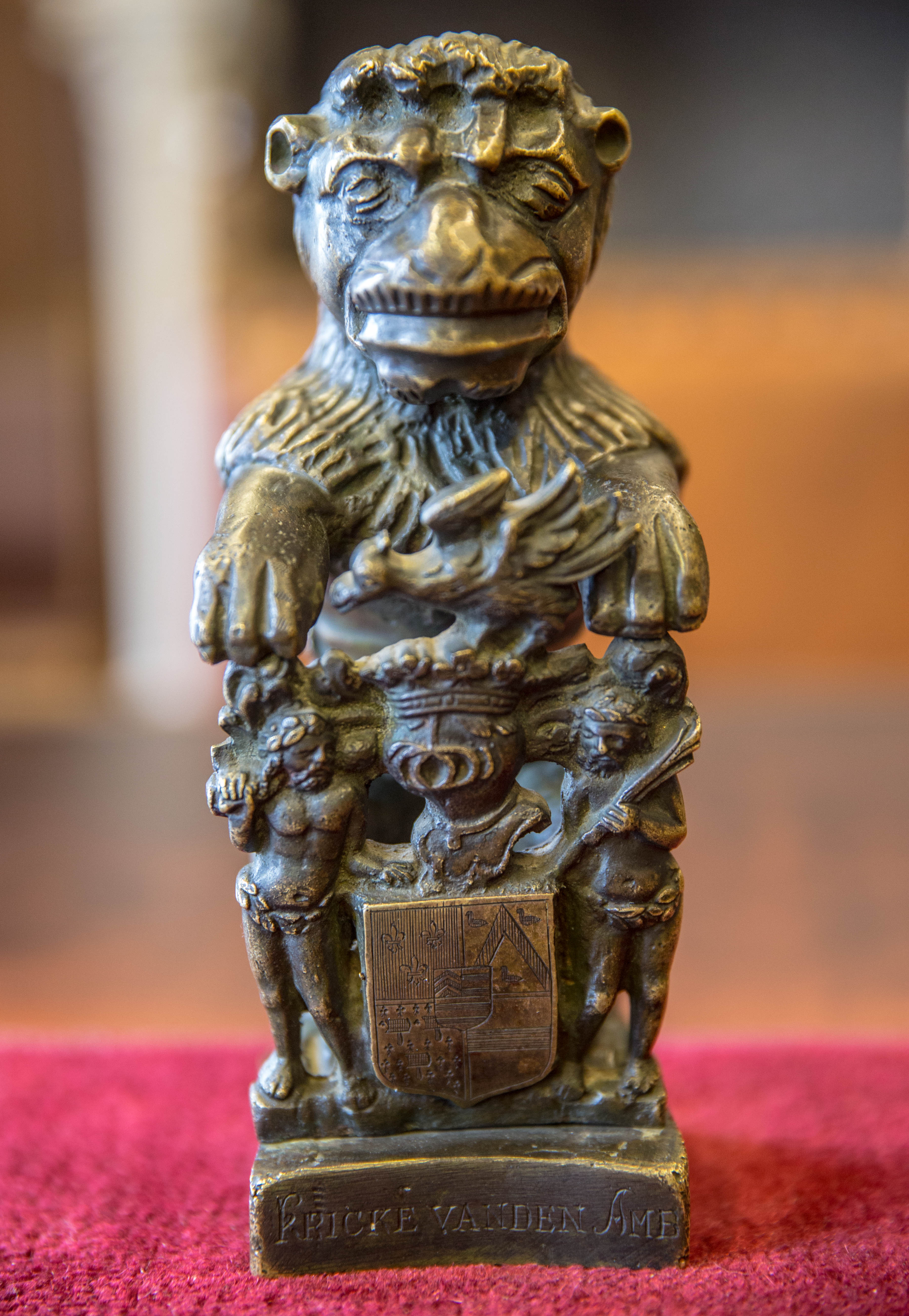 Frontaal shot van het Beernems Beertje met het wapenschild en een deel van de inscriptie op de sokkel. De foto werd genomen tijdens het maken van een Iedereen Beroemd-reportage over het Beernems Beertje.